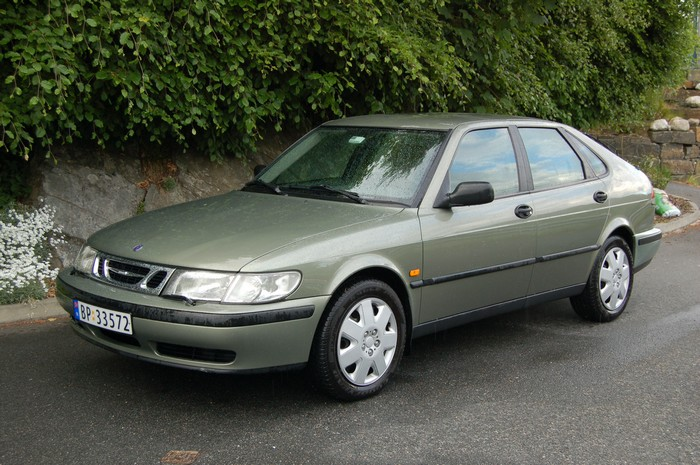 Saab 9-3, 1999 modell